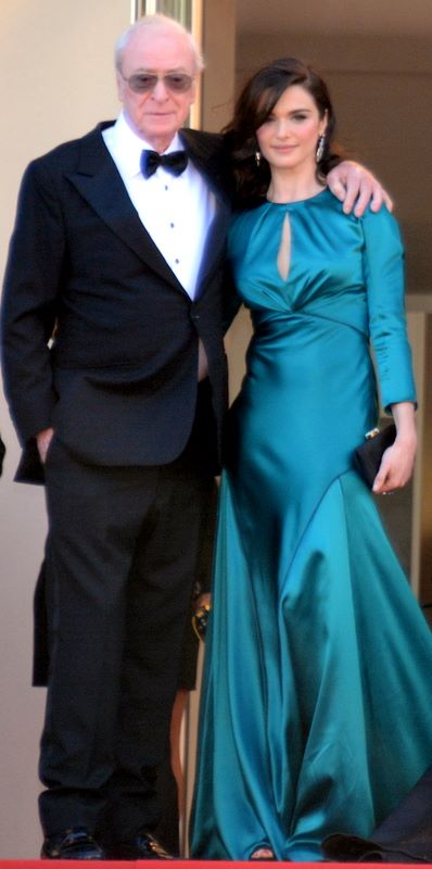 Michael Caine et Rachel Weisz lors de la présentation de "Youth" au festival de Cannes